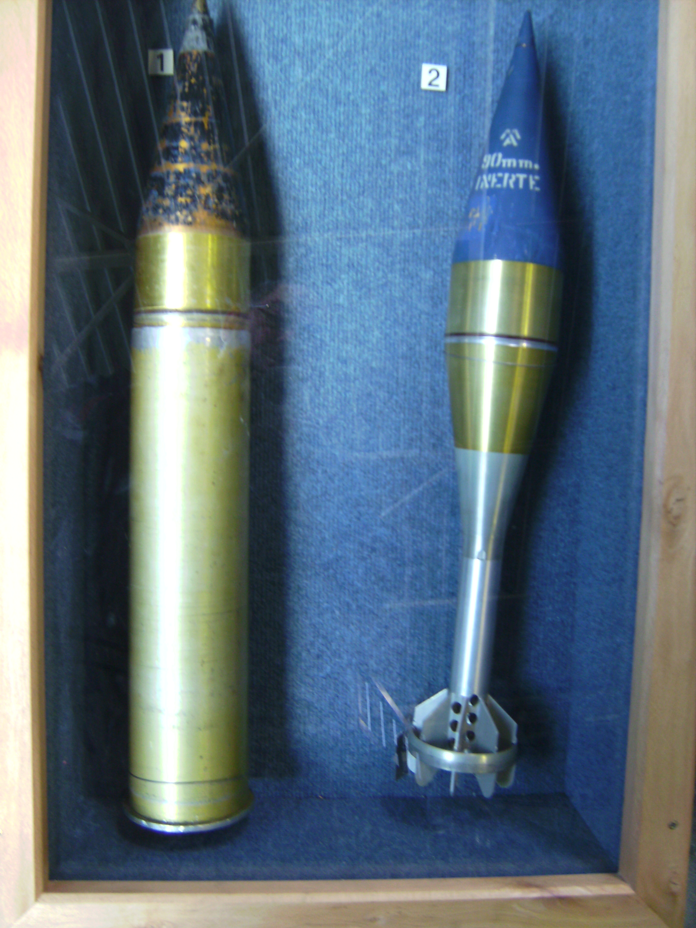 Panzergranate 90 mm Flügelstabilisiert